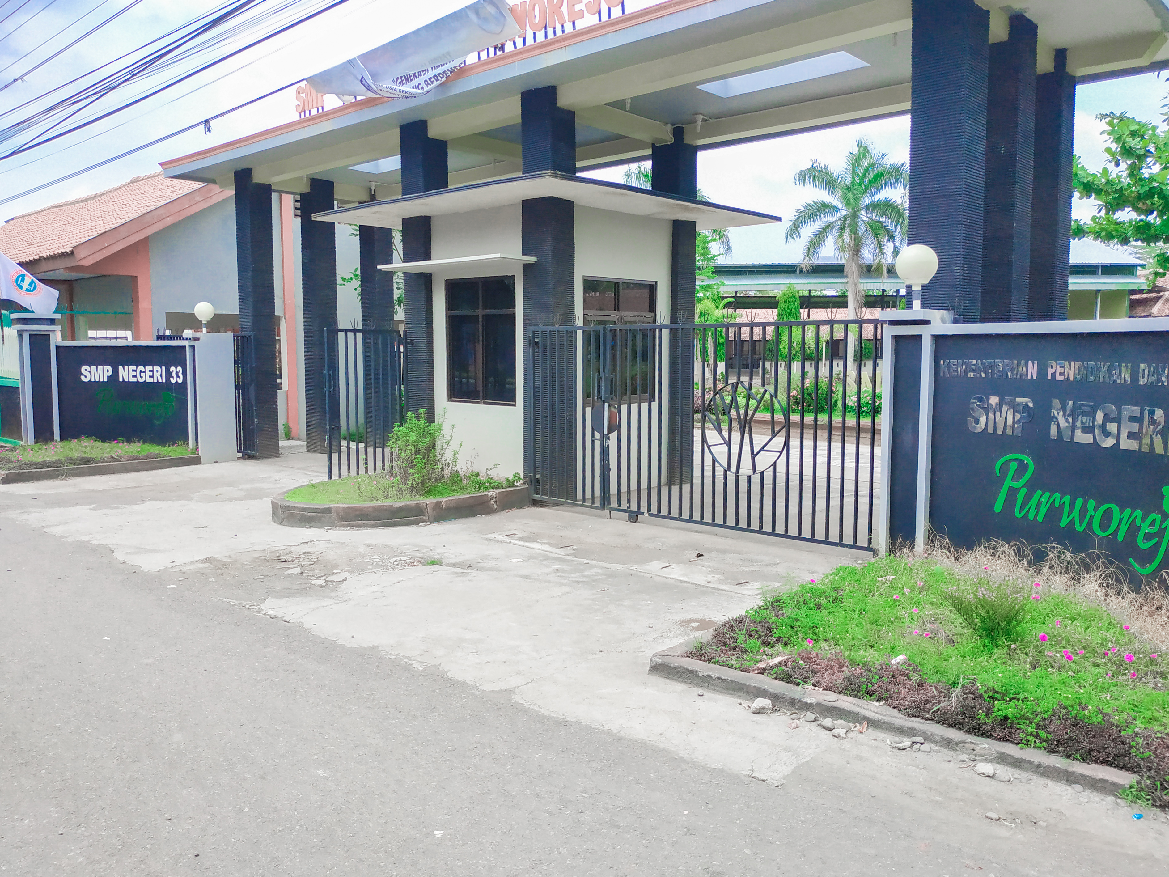 Gerbang Masuk SMPN 33 Purworejo setelah di renovasi. Tampak Luas